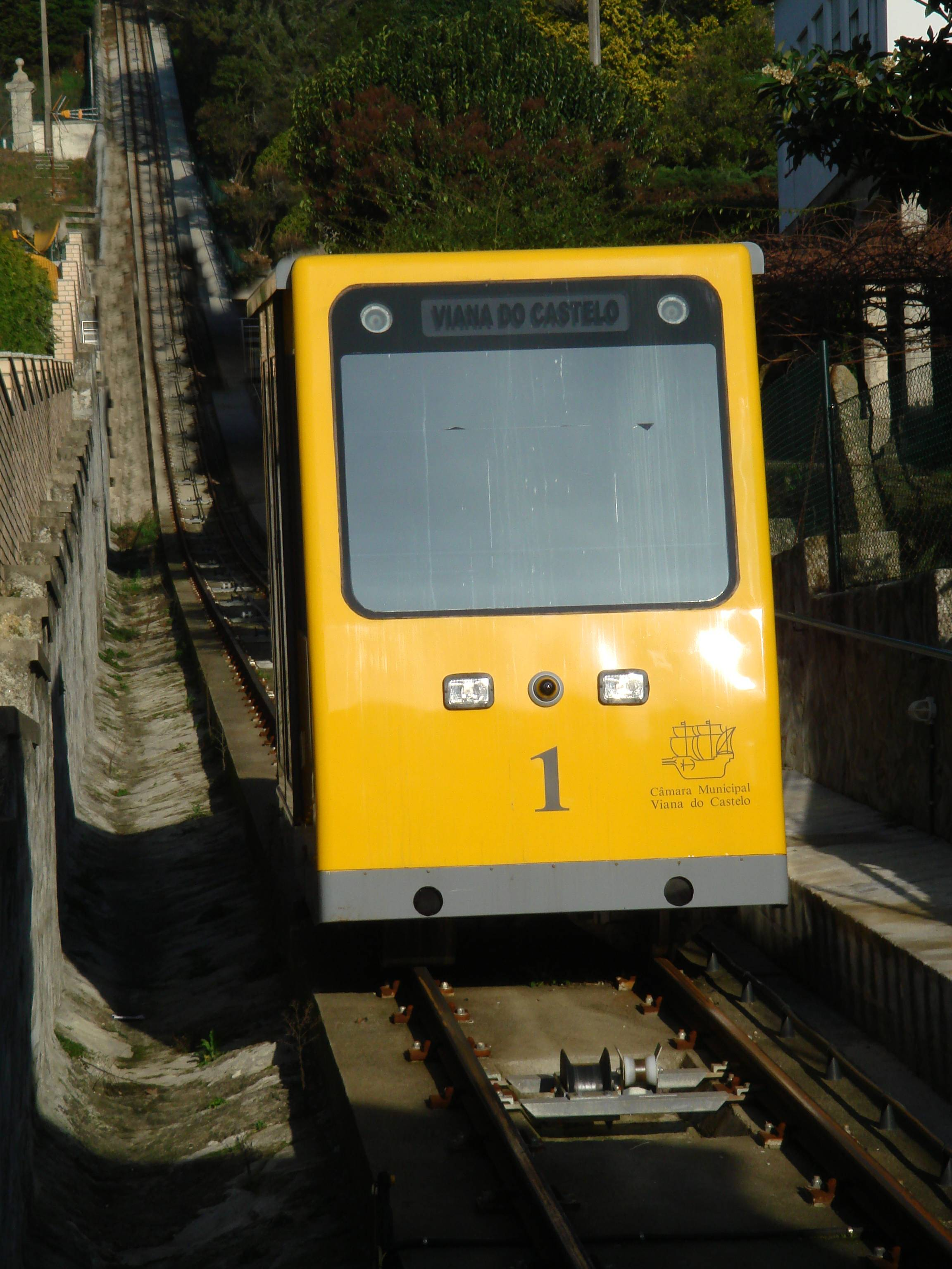 Santa Luzia Funicular in Viana do Castelo Portugal